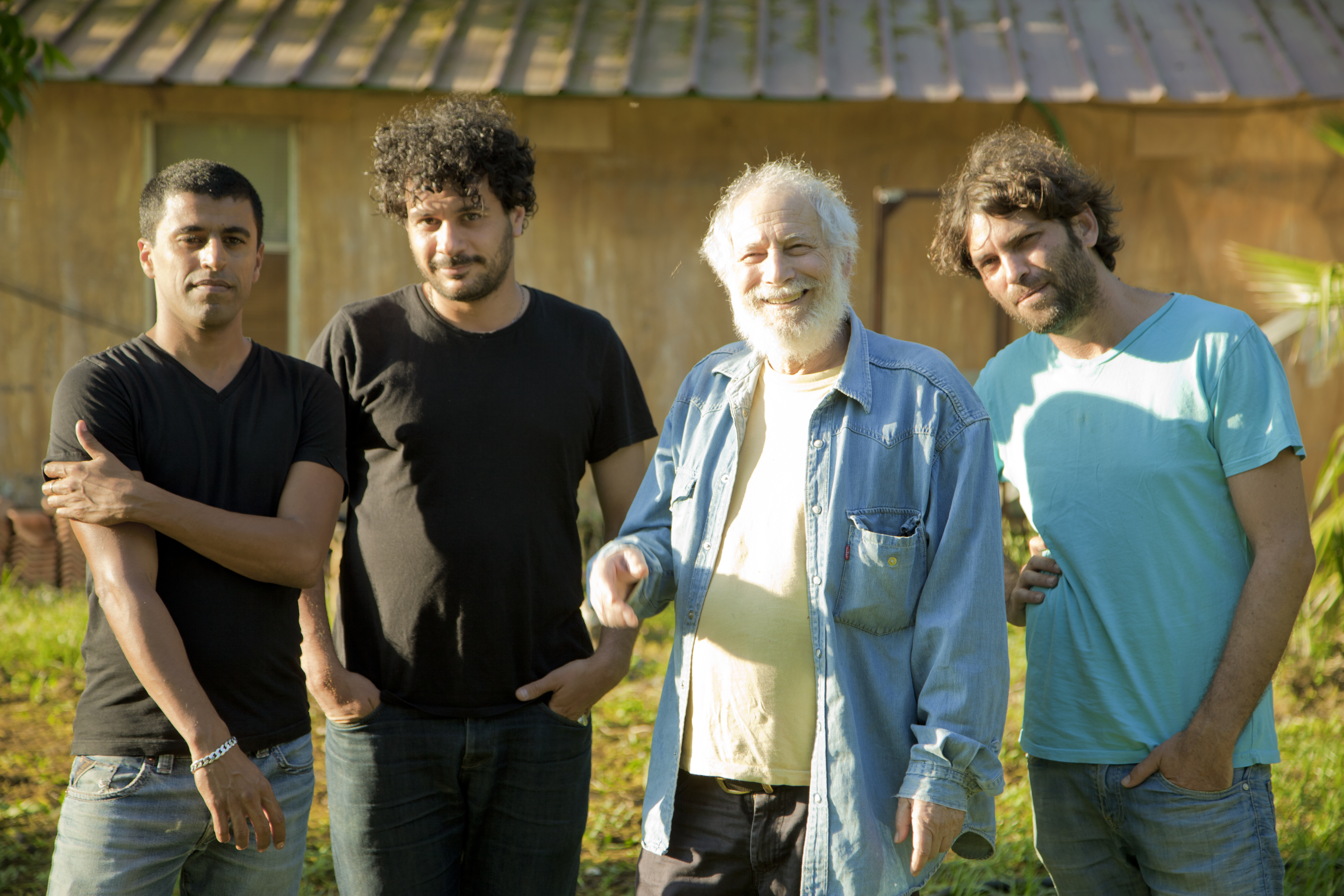 החצר האחורית הוא פרויקט של יענקל'ה רוטבליט אשר חבר אל שלושה יוצרים-מבצעים אשר יחדיו הם יוצרים את "החצר האחורית מימין לשמאל: גדי רונן, יענקלה רוטבליט, , איתמר ציגלר ותומר יוסף